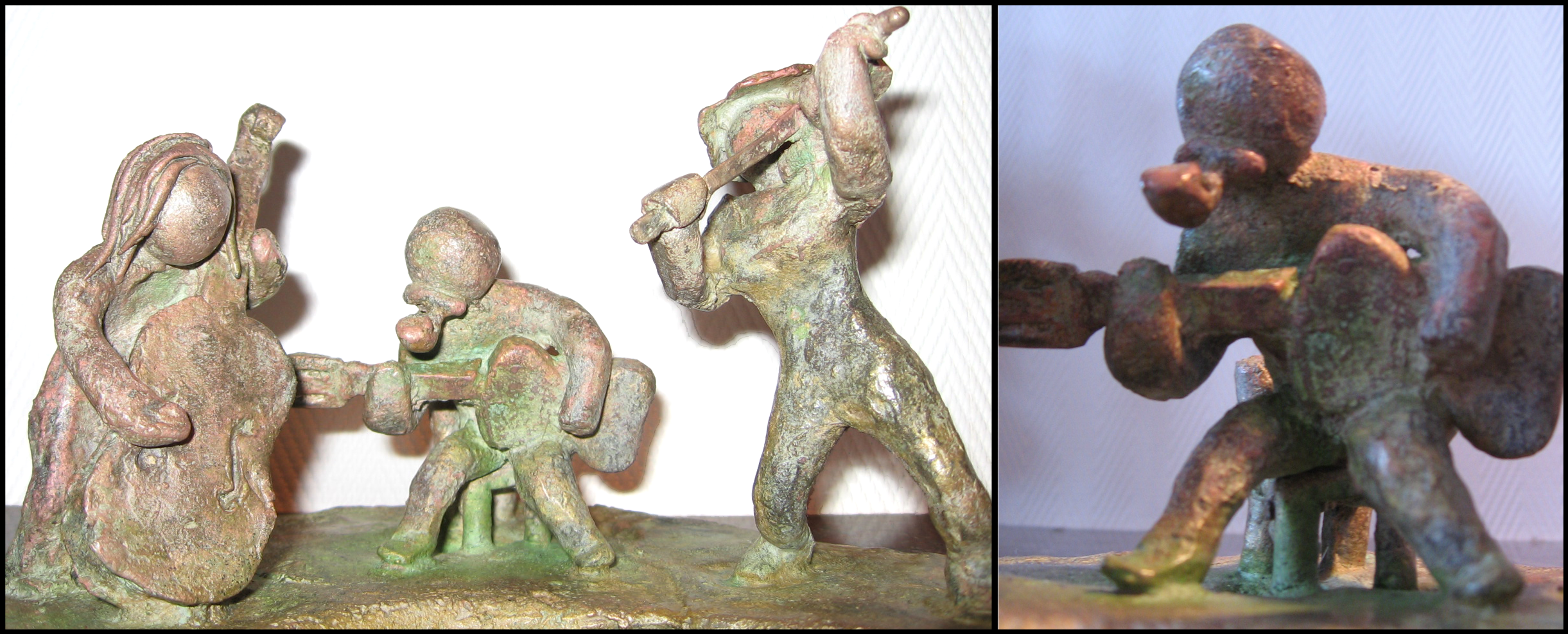 Sculpture en bronze patiné représentant un orchestre de jazz Montage photographique réalisé à partir de photos personnelles